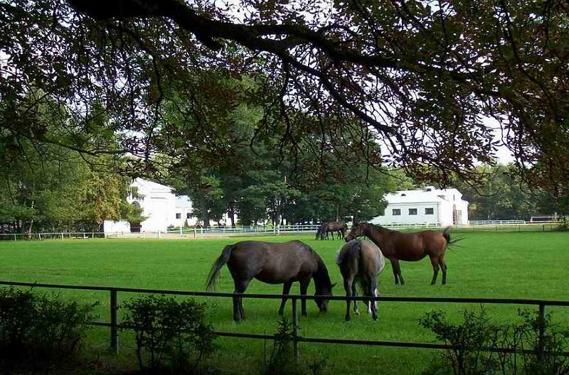 Konie koło stajni